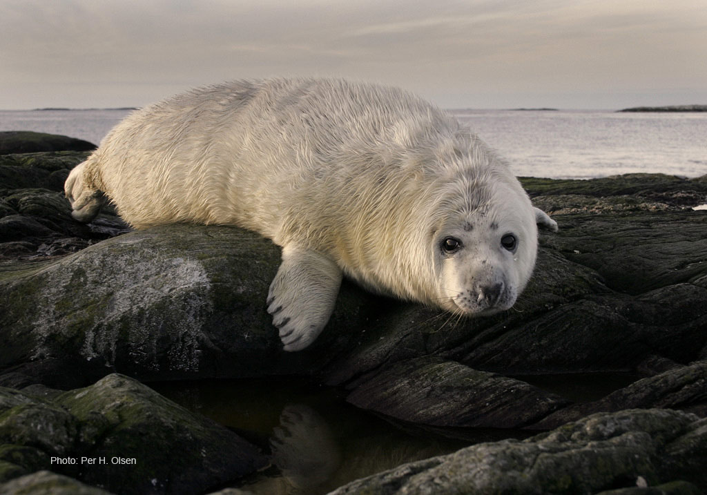 Havertunge i Froan, Trøndelag. Halichoerus grypus, Gråsel, grey seal